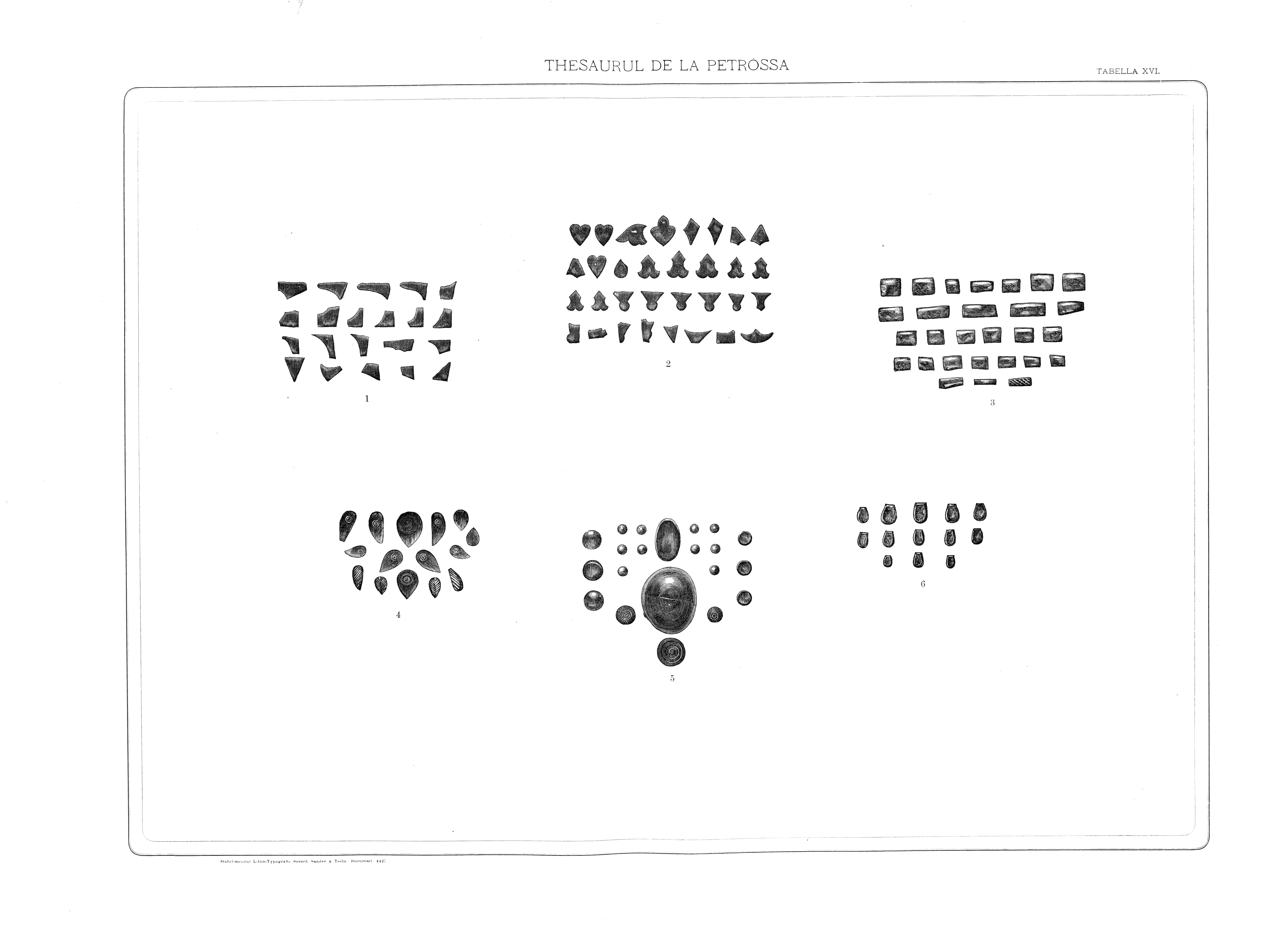 Granate și cristaluri căzute.